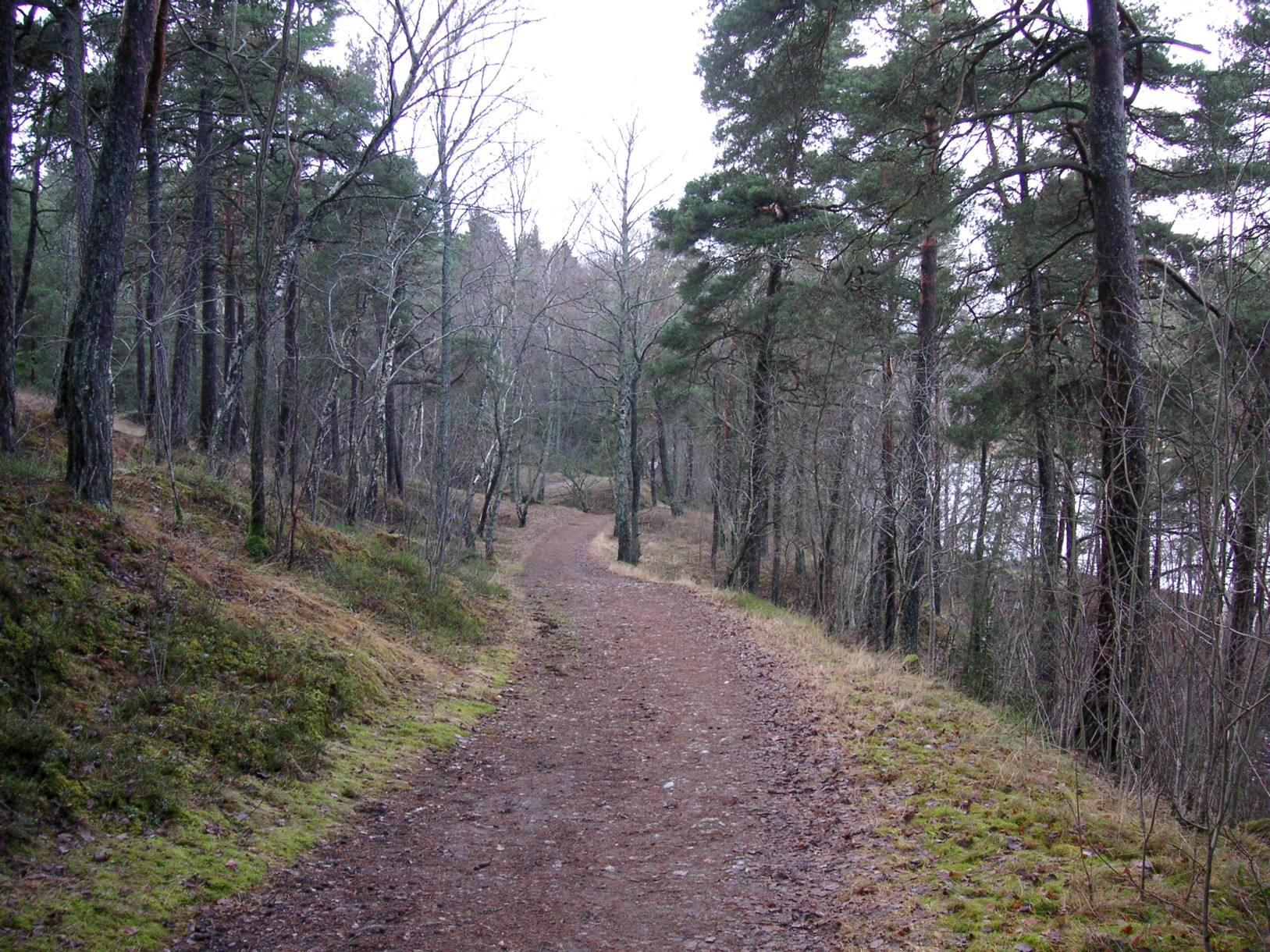 Göta landsväg vid Flottsbron